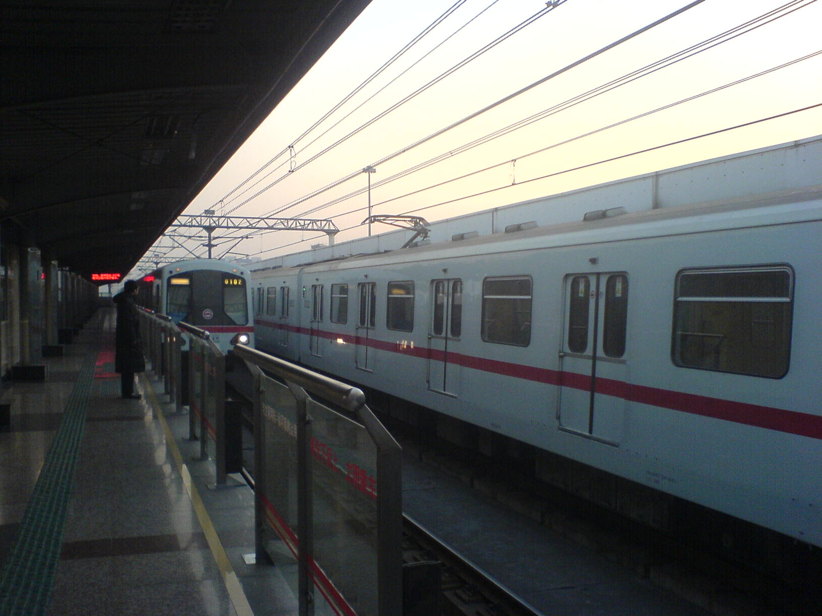 共富新村站站台